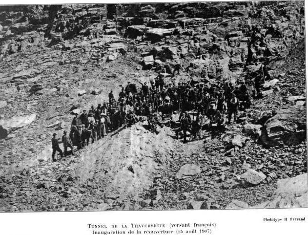 Réouverture en 1907 du tunnel de la Traversette.